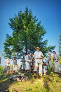 Įvesdinimo apeigos ant Dijokalnio